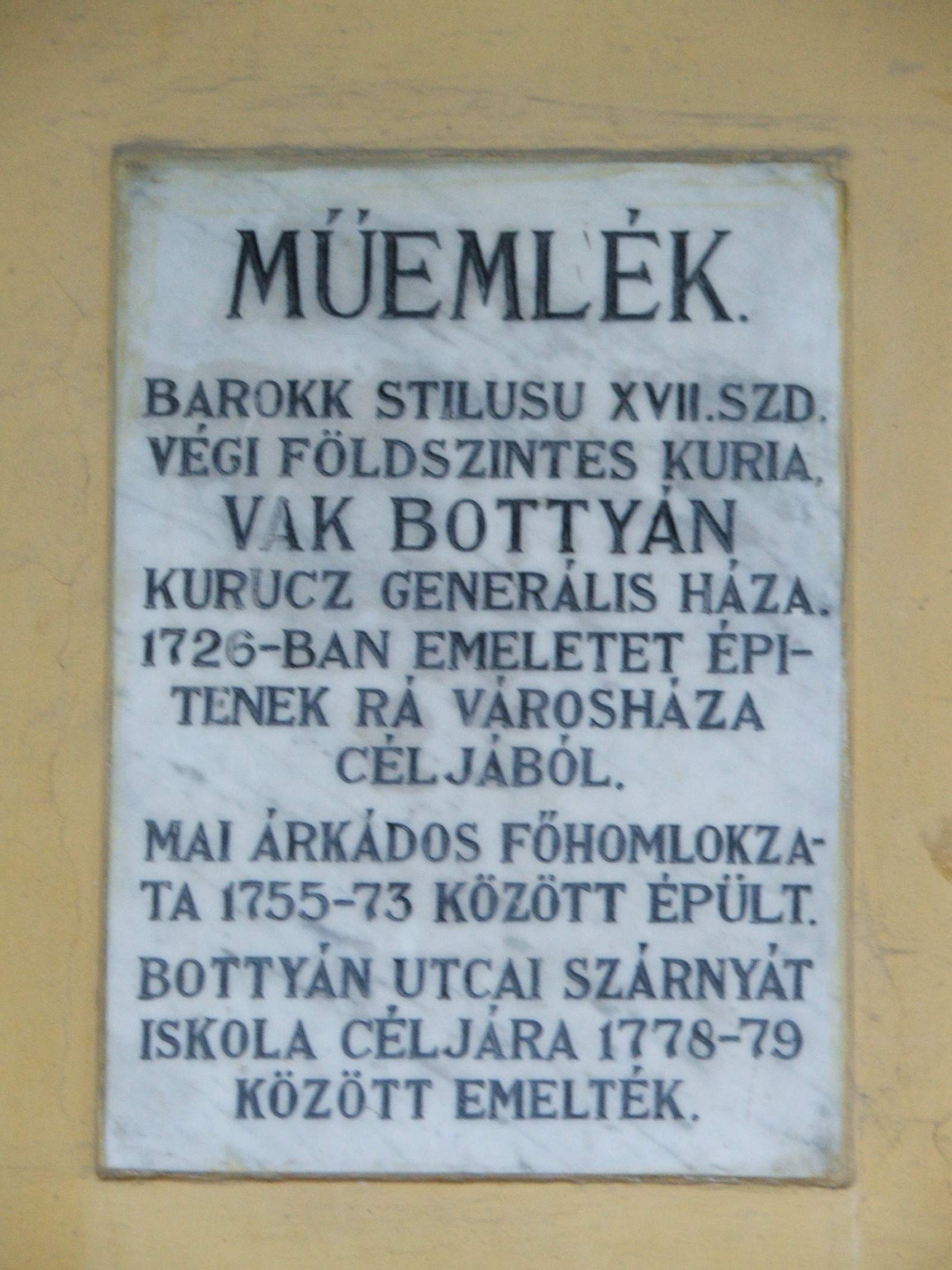 Ex Bottyán-palota. Széchenyi tér 1, Városháza